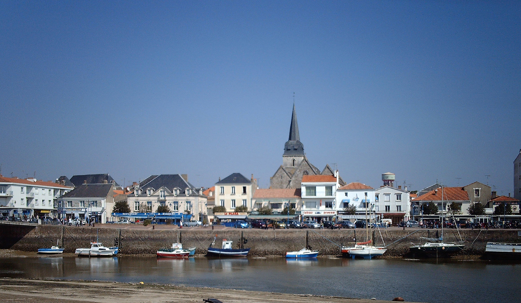 Saint-Gilles-Croix-de-Vie dans le département de la Vendée (France) : vue de Saint-Gilles depuis Croix-de-Vie en avril 2007.